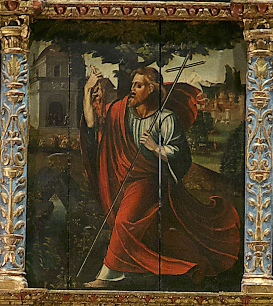 Plasencia, Iglesia de San Nicolás, Retablo de San Zoilo, detalle: San Zoilo con sus riñones